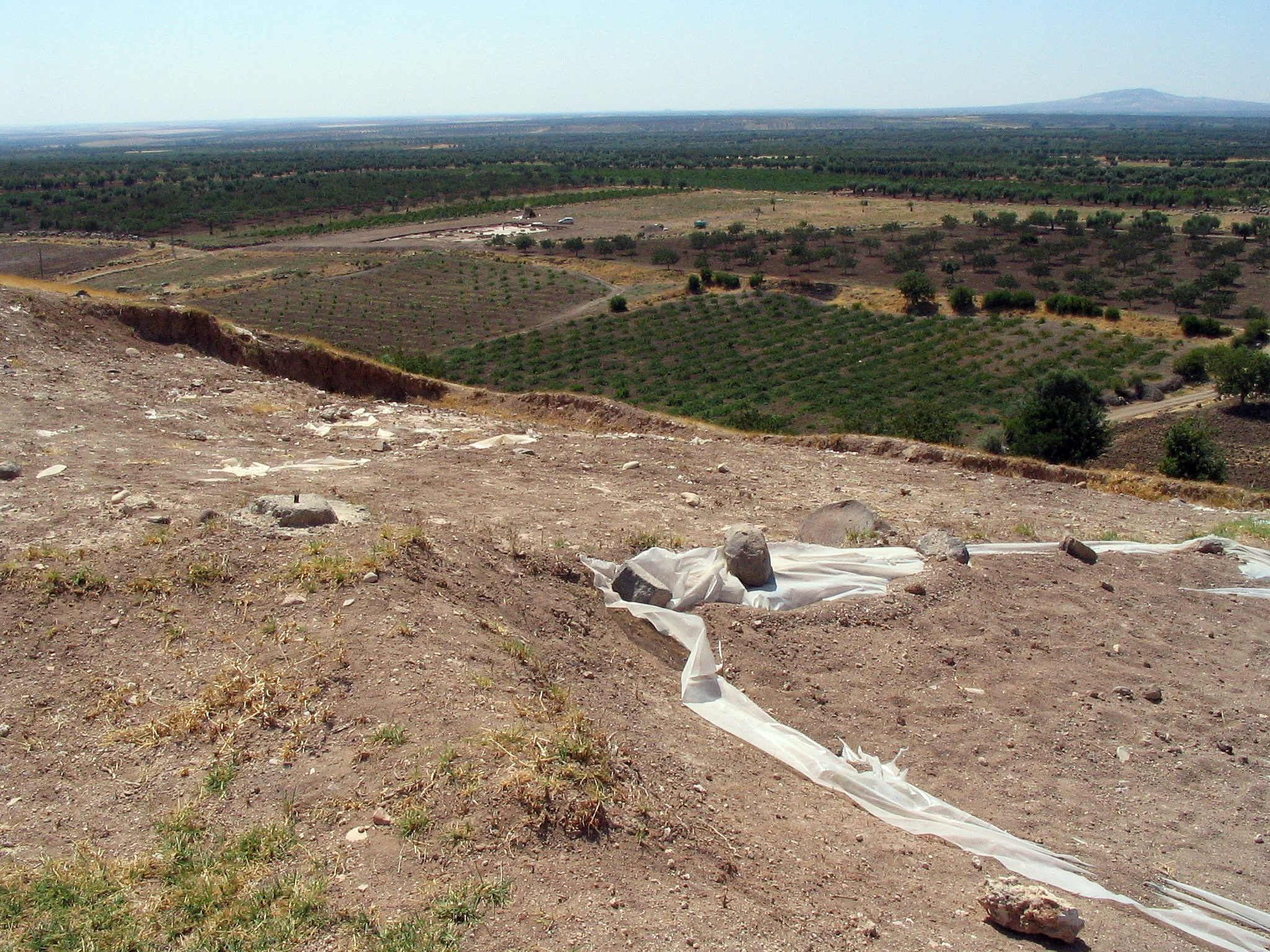 Siedlungshügel Oylum Höyük, Südosttürkei